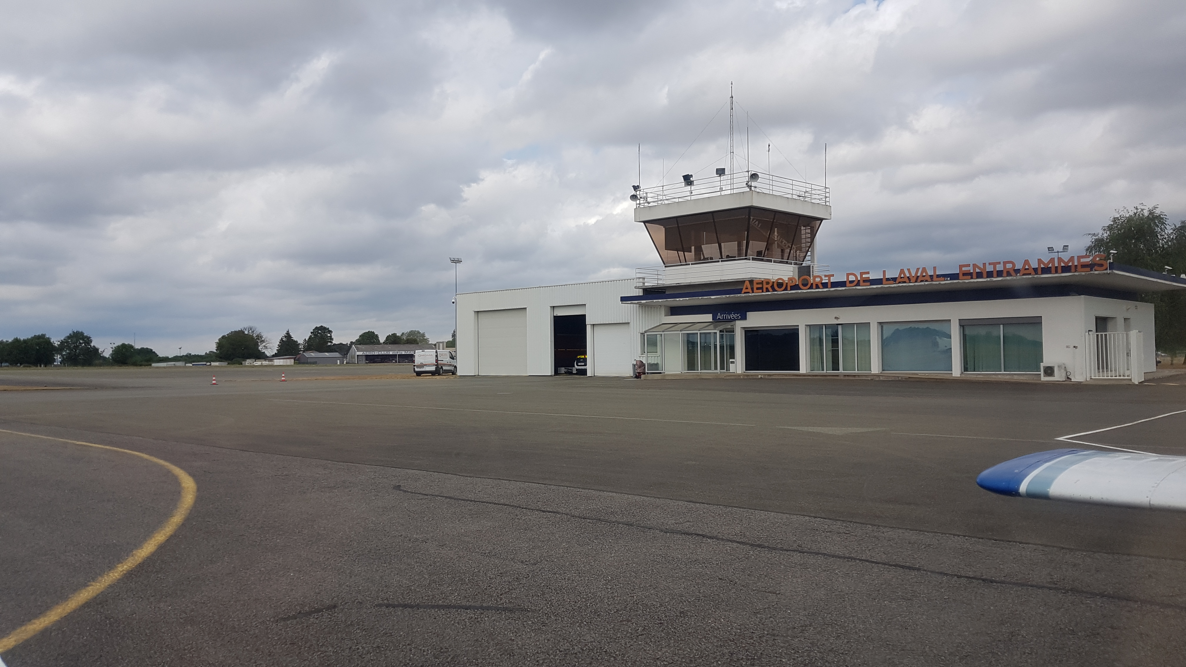 Bâtiment principal de l'aéroport de Laval